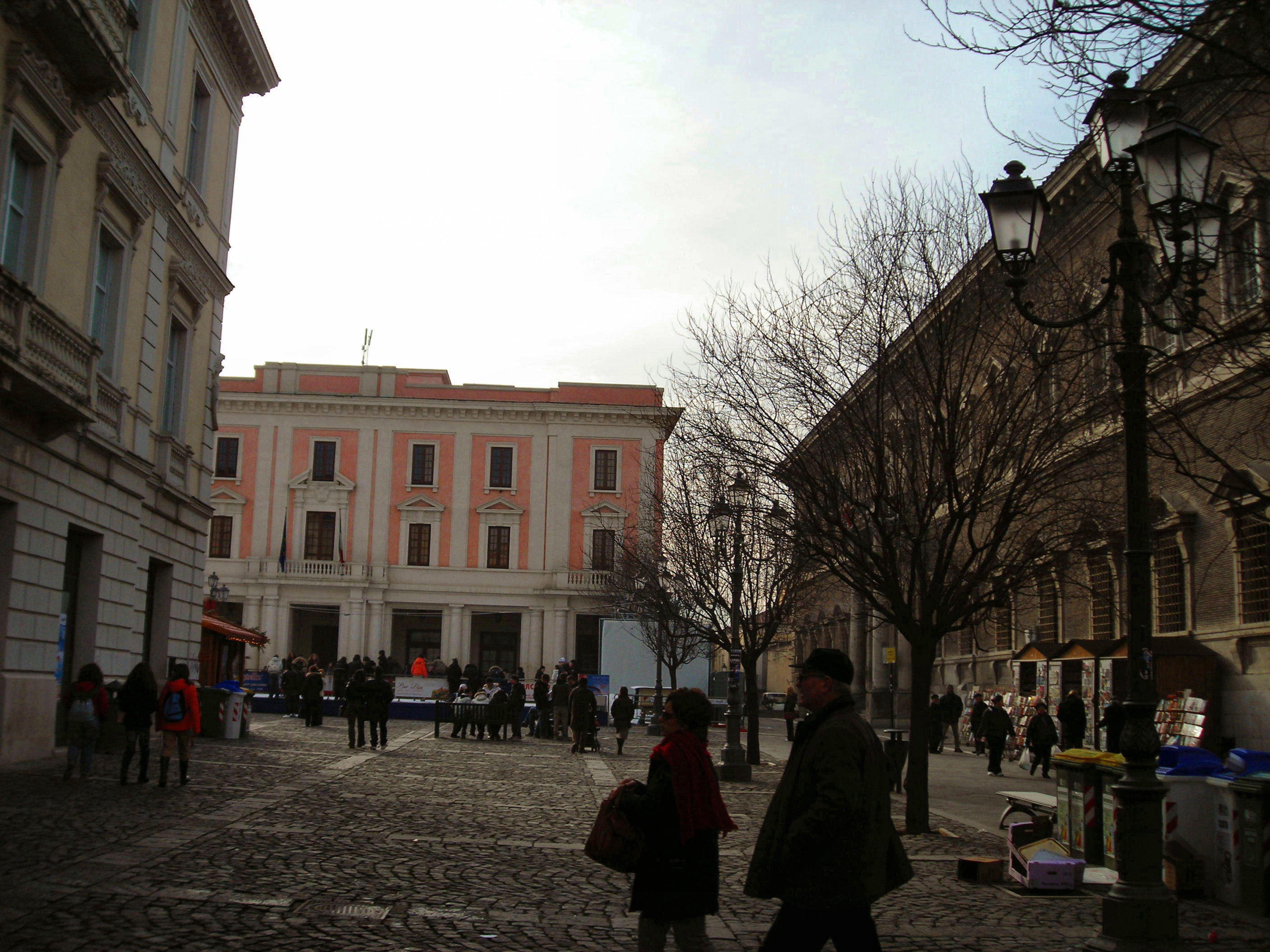 Piazza Roma (Rome Square), Benevento